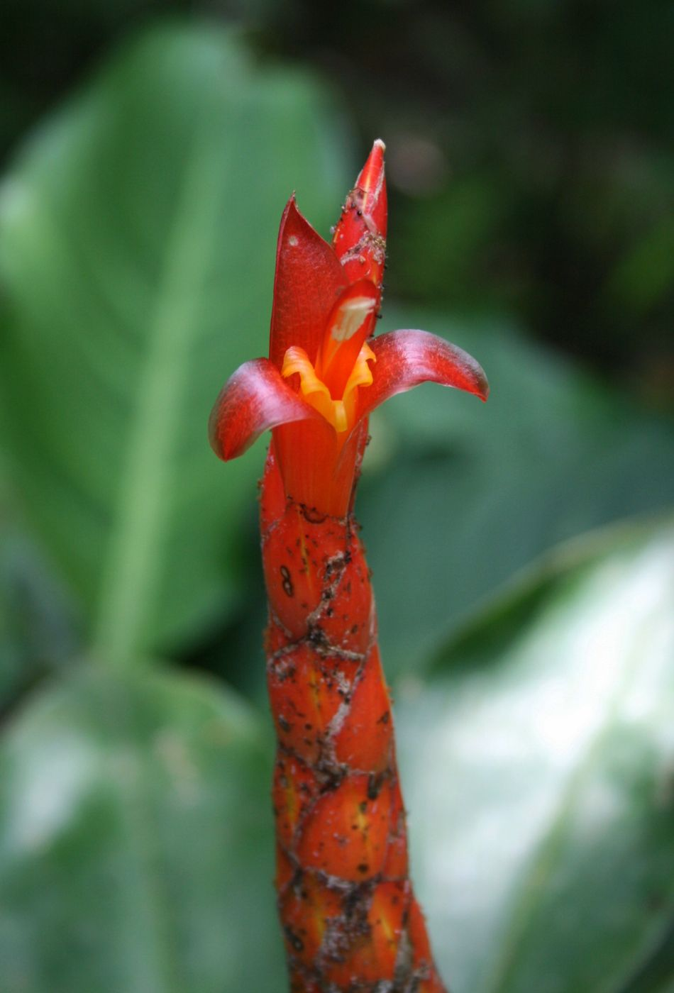 Costus pulverulentus, Costaceae - Costa Rica: Prov. Puntarenas, La Gamba NW Golfito, zwischen "Tropenstation La Gamba"/"Estación Biológica La Gamba" und "Esquinas Rainforest Lodge"